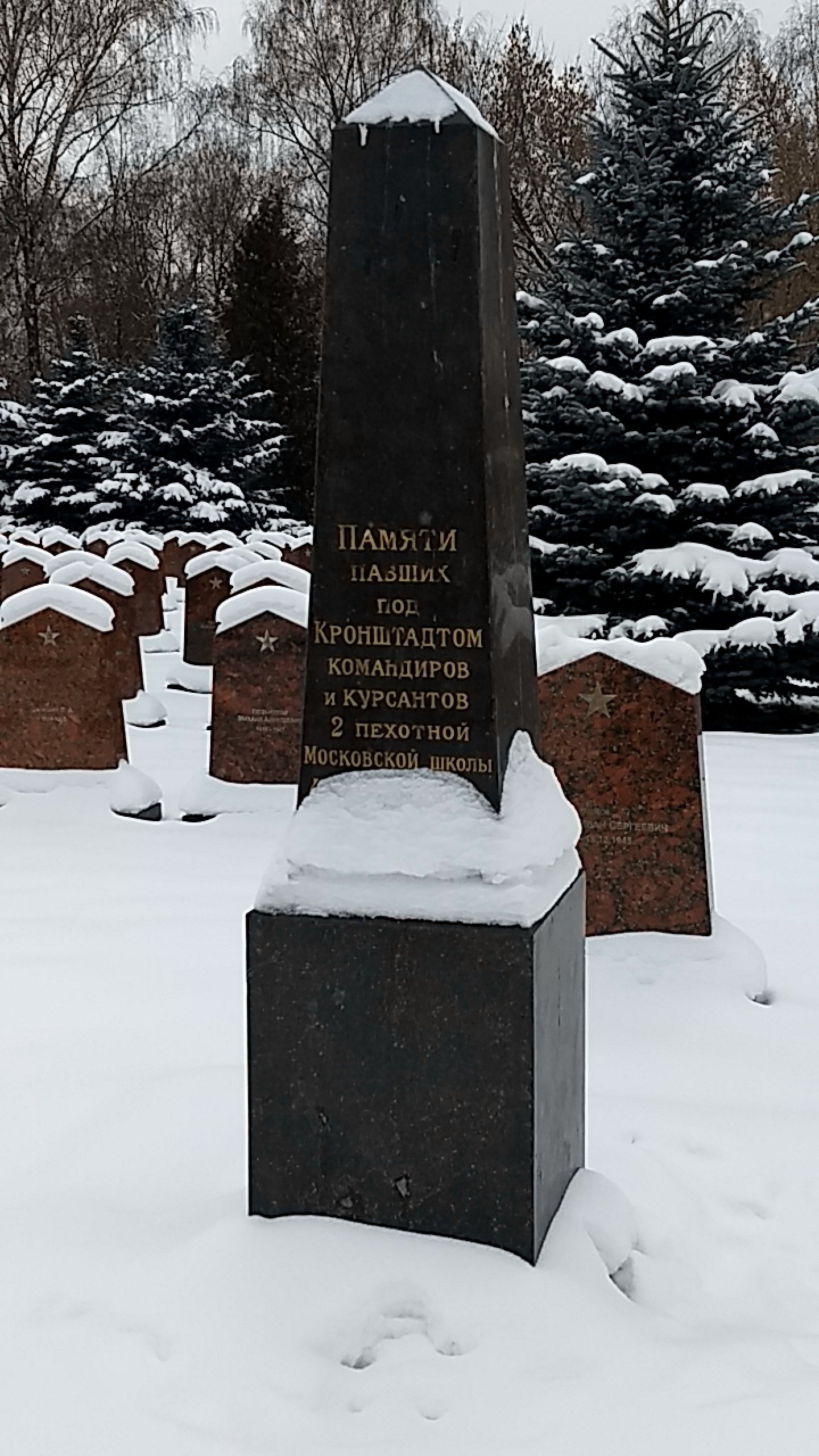 Памятник на Преображенском кладбище Москвы